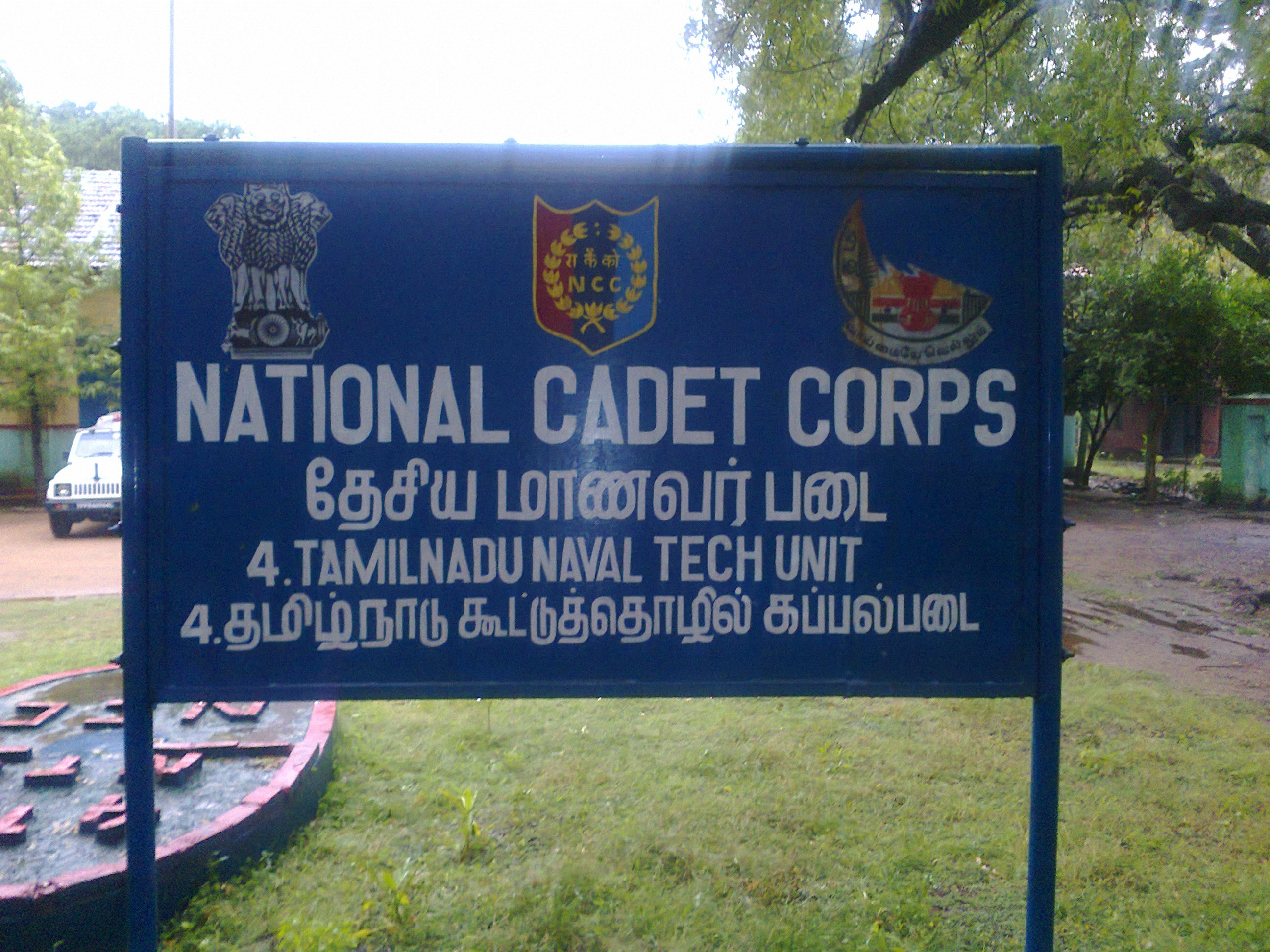 ncc board